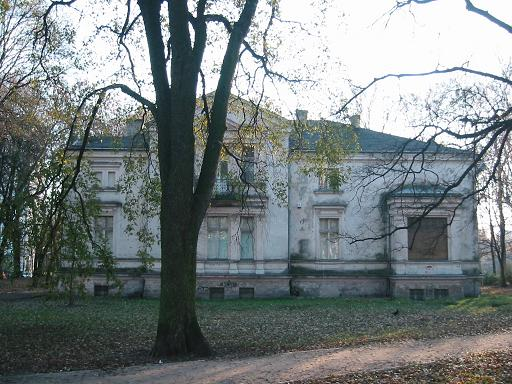 Willa Ludwika Anstadta w Łodzi, ul. Sędziowska 18